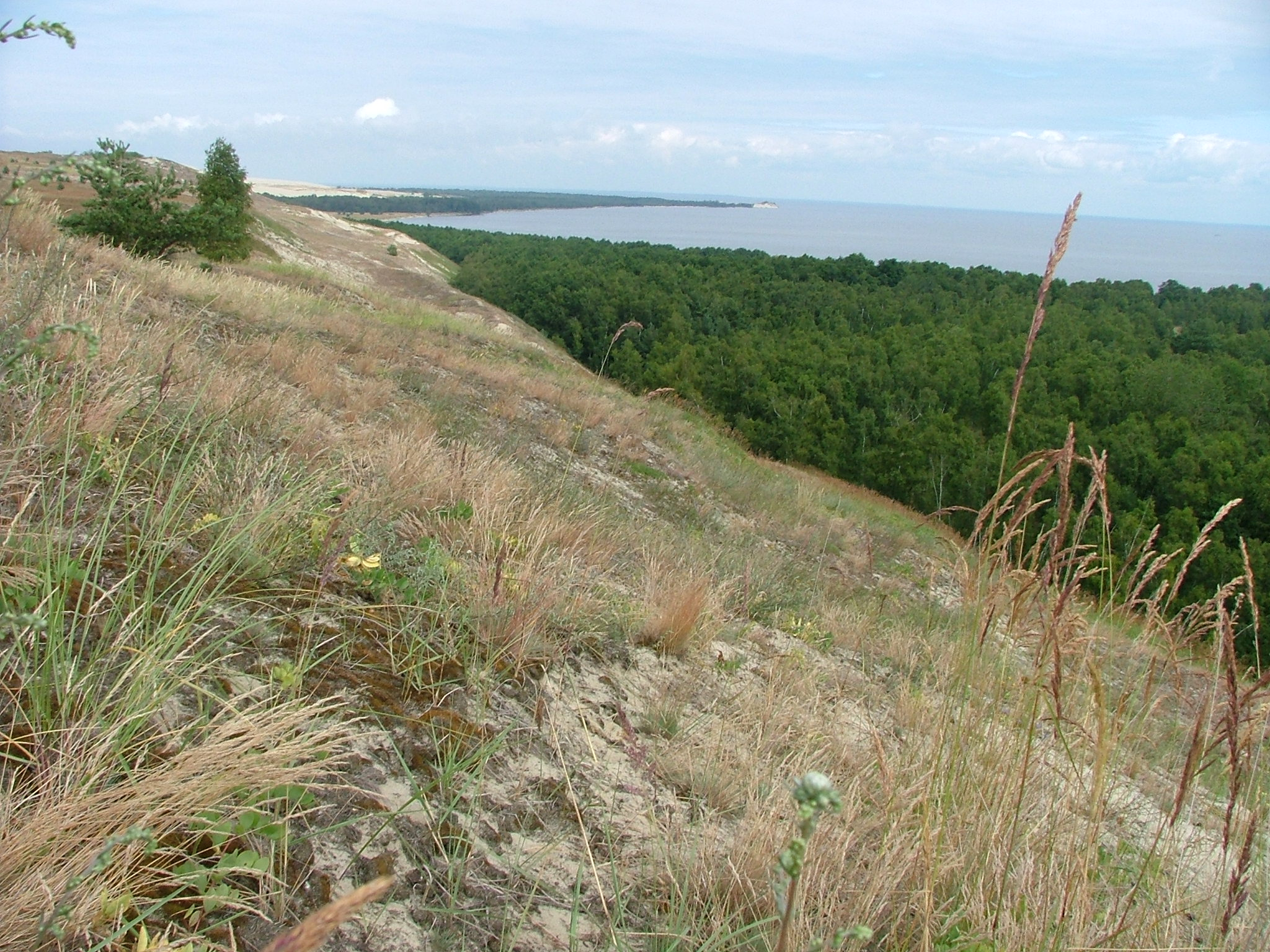 Kurische Nehrung und Kurisches Haff – Russischer Teil, Blick aufs Haff